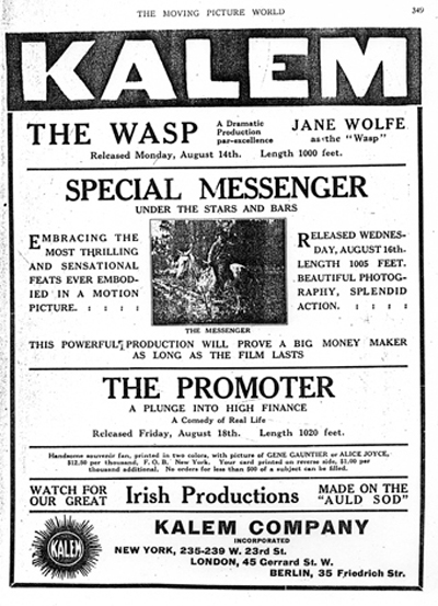 Publicité films Kalem, parue dans The Moving Picture World